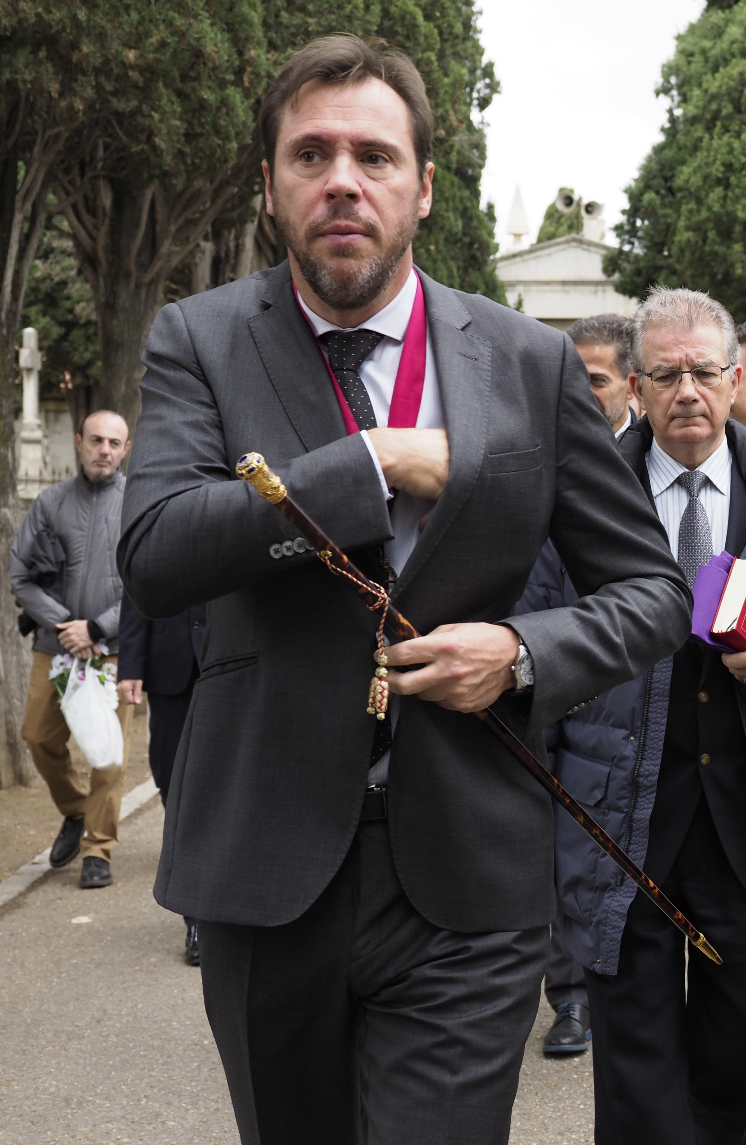 1-11-2019 - Solemnidad de Todos los Santos con visita al Cementerio del Carmen de Valladolid y Eucaristía presidida por en cardenal arobispo de Valladolid, don Ricardo Blázquez en el Santuario del Carmen Extramuros.